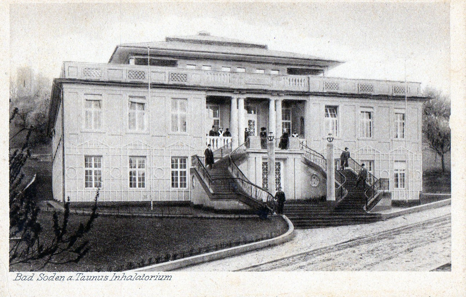 Bad Soden Taunus Medico Palais um 1930